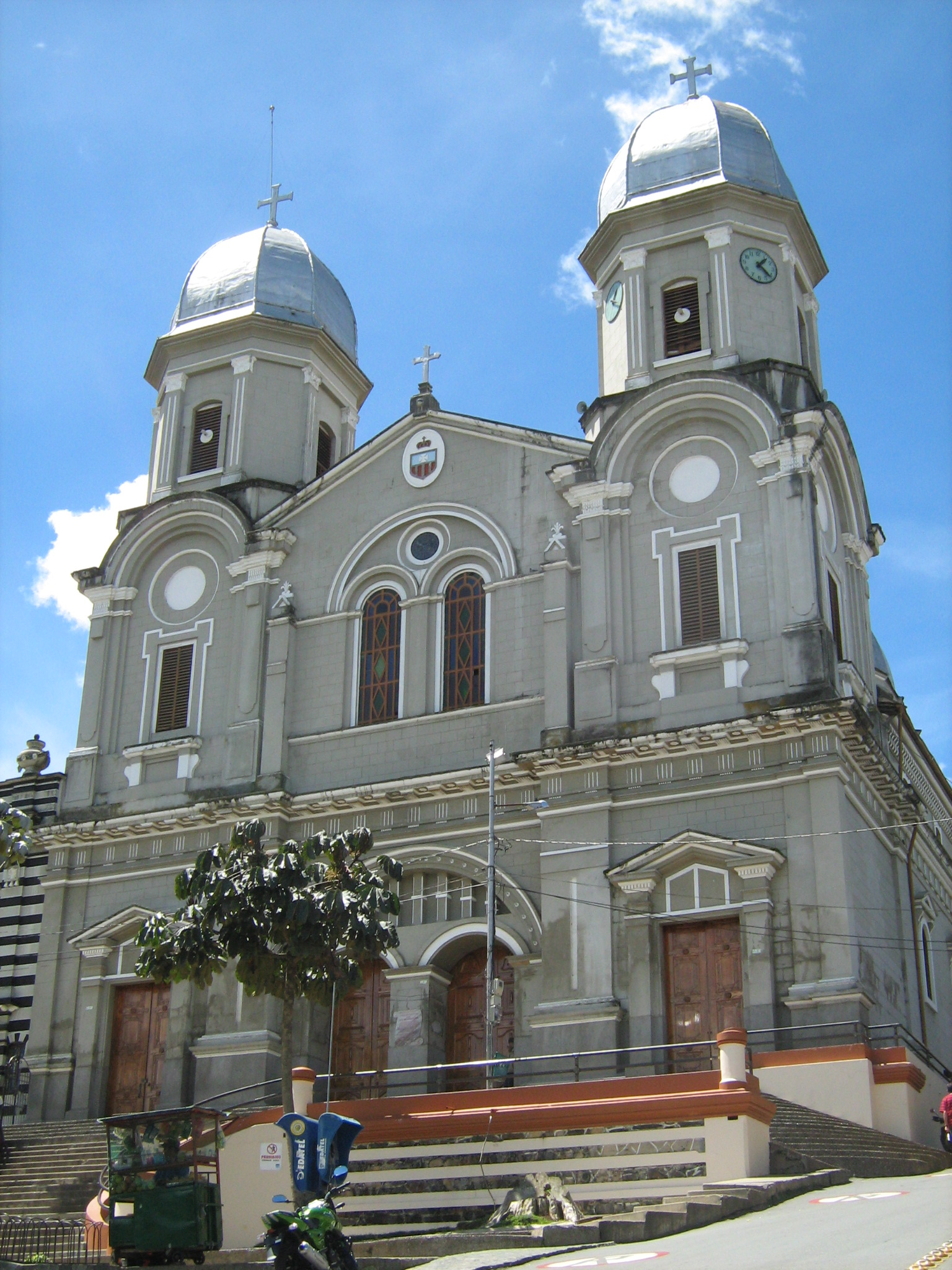 Fachada de la Basílica de Yarumal, Antioquia, Colombia.